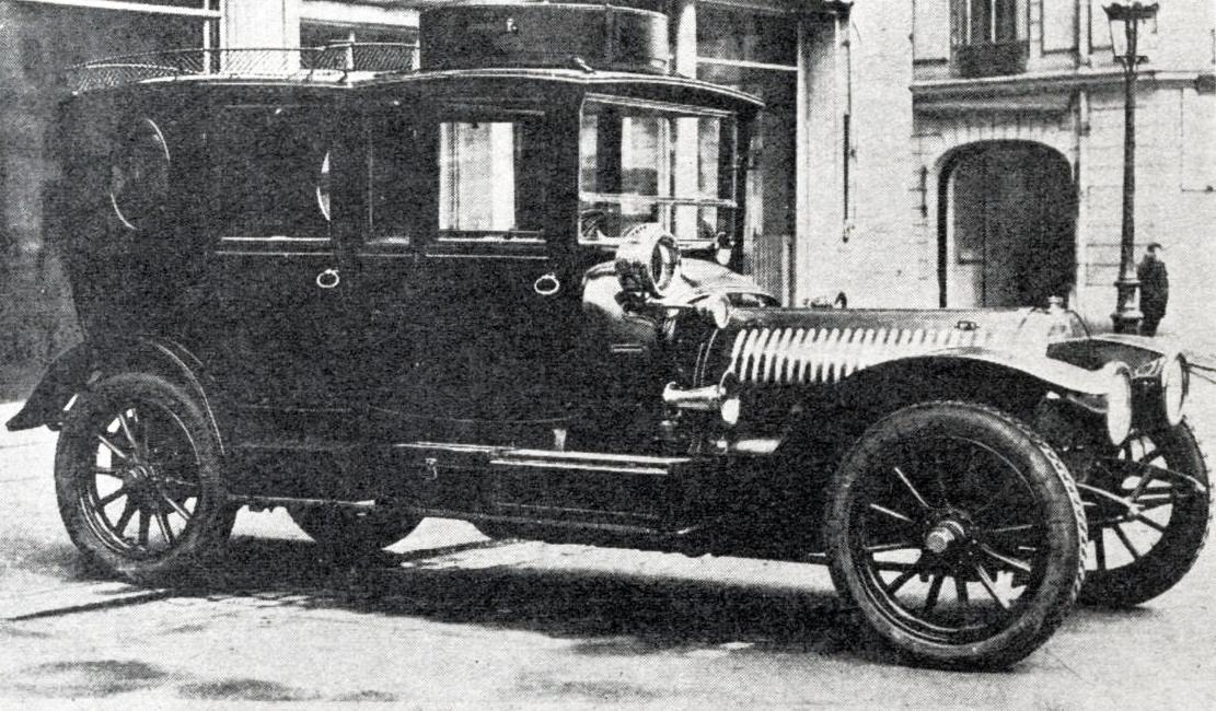 La première six cylindres Hotchkiss sortie des usines, en 1906 (roulant toujours en 1931, après 330 000 kilomètres parcourus).